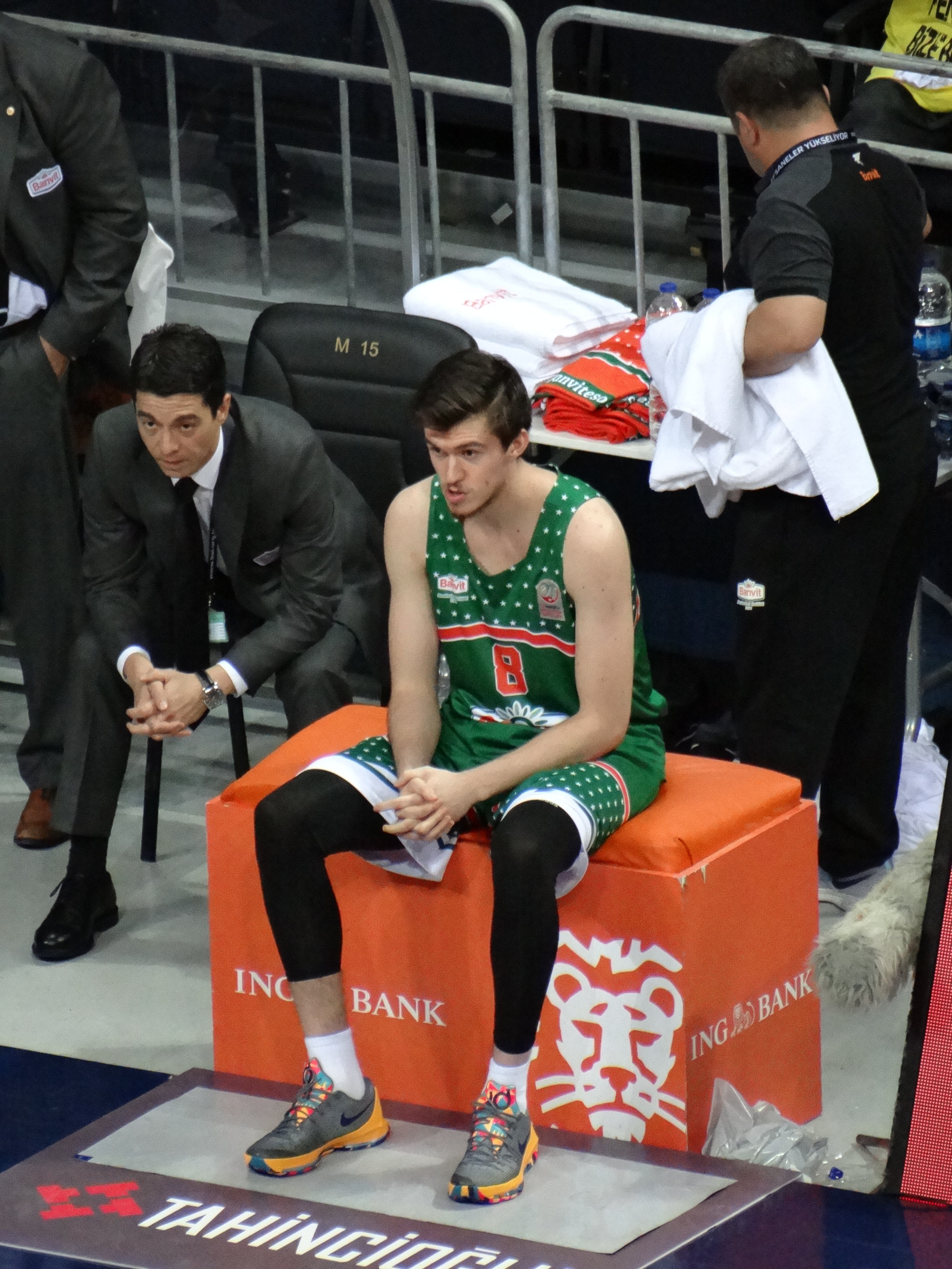 Tolga Geçim 20171007